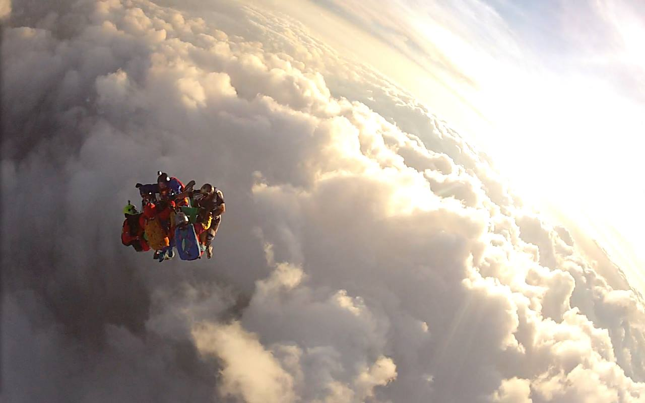 Salto "hotdog" en skydive Cuautla